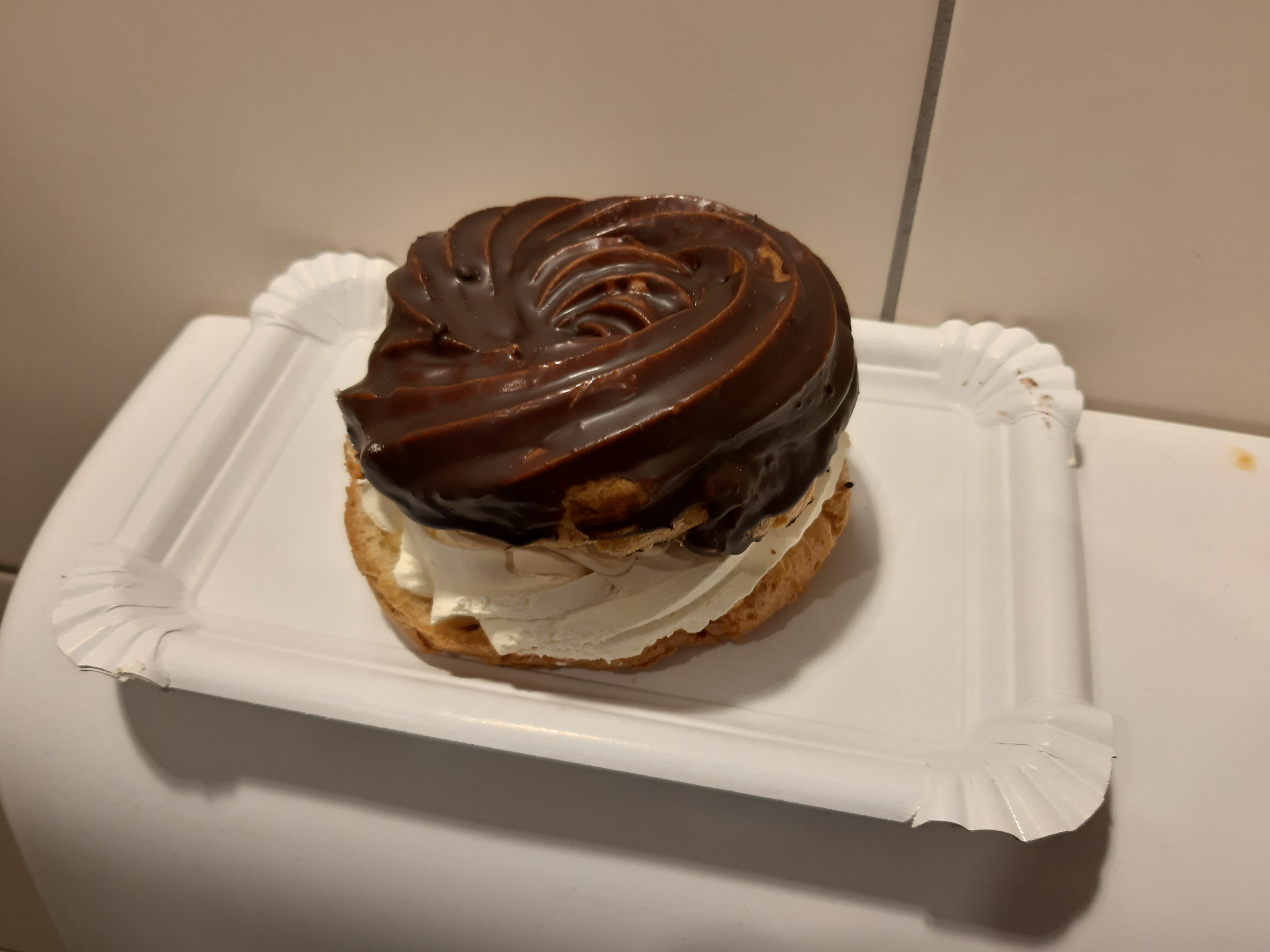 VĚTRNÍK s čokoládovou polevou. Foceno na hajzlech v Kauflandu @ Řípská 27, 627 00 Slatina 8-) Svůj k svému, hnědá k hnědé...! )